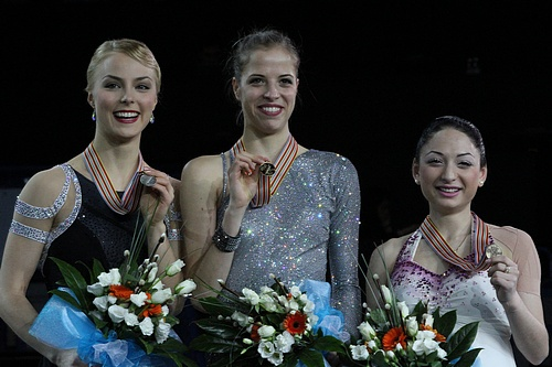 Подиум в женском одиночном катании на чемпионате Европы по фигурному катанию 2012. Слева на право: Киира Корпи (Финляндия, 2-е место), Каролина Костнер (Итлия, 1-е место), Элене Гедеванишвили (Грузия, 3-е место).